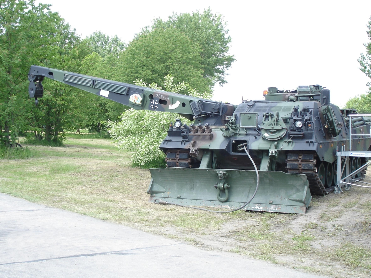 Bergepanzer „3“ Büffel des 1./Panzerbataillon 393